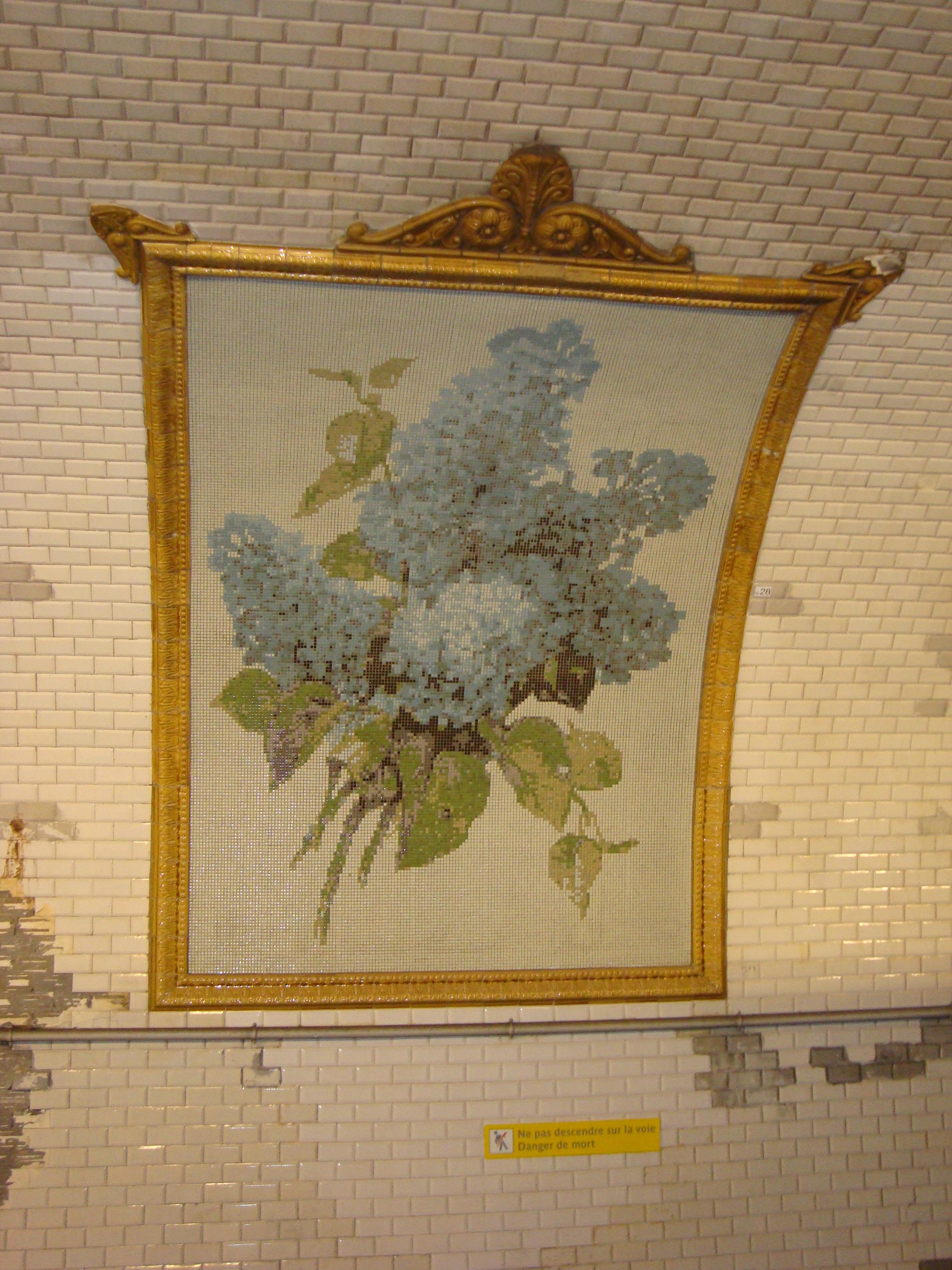 Décoration en lilas quai Porte des Lilas sur la ligne 11.